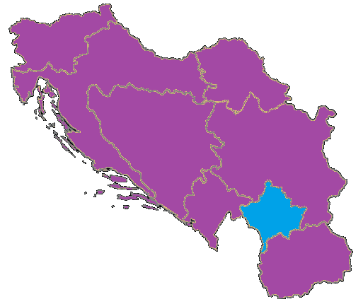 Ubicación geografica de Kosovo en la antigua Yugoslavia